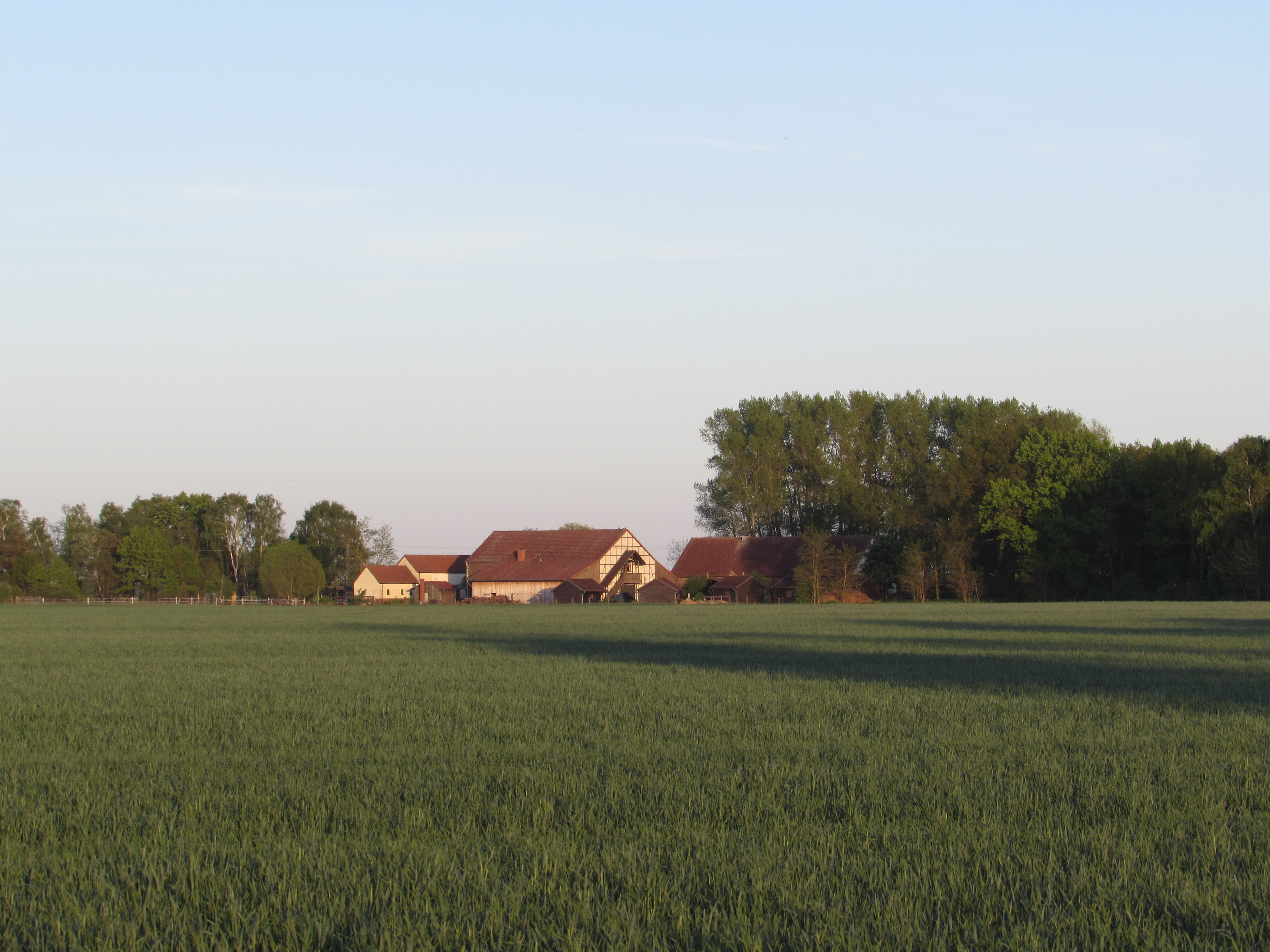 königsrode beziehungsweise der königsroder hof im fiener bruch, vorwerk tucheims